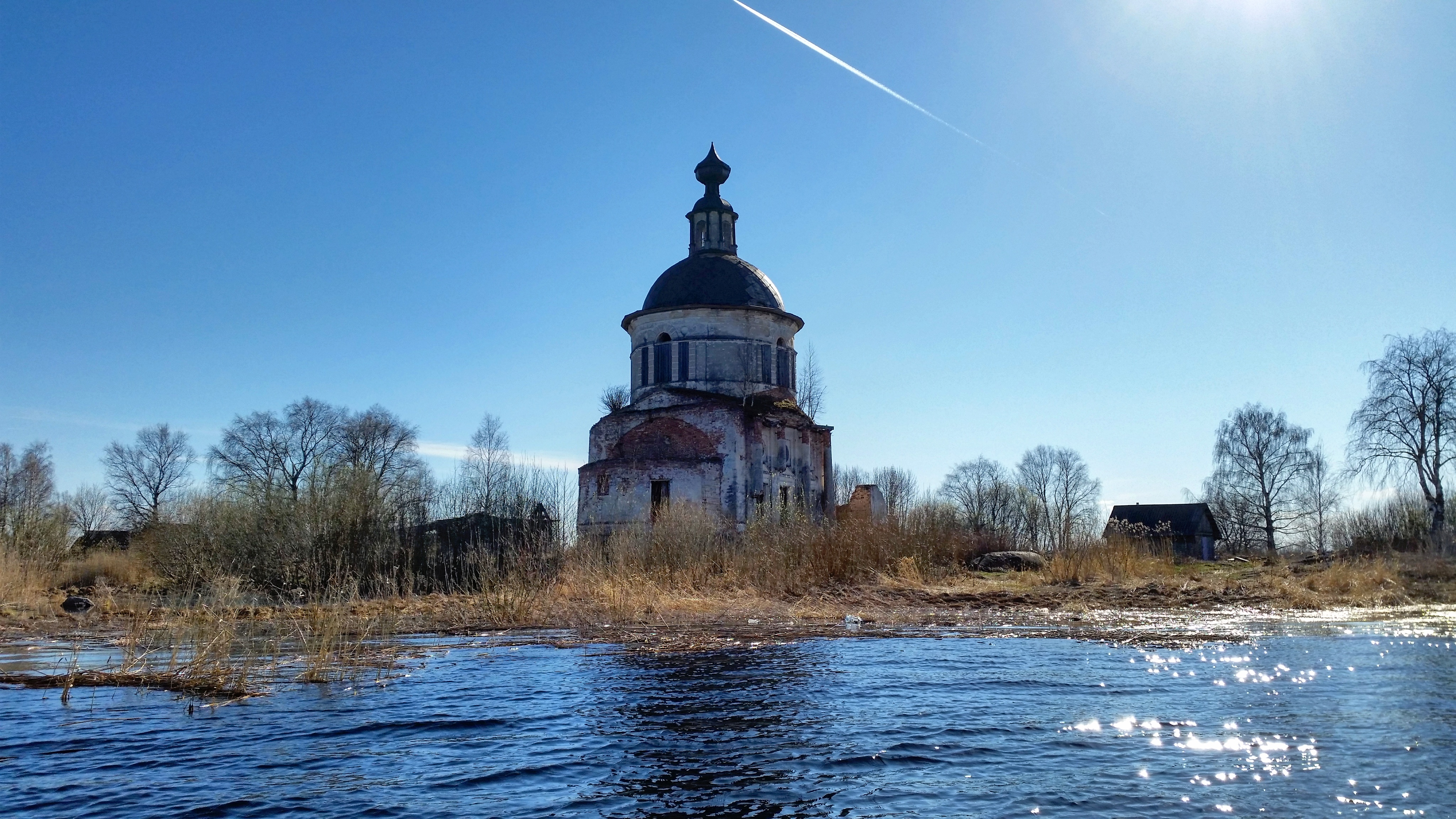 Церковь Иоанна Златоуста 1826г в Чаронде